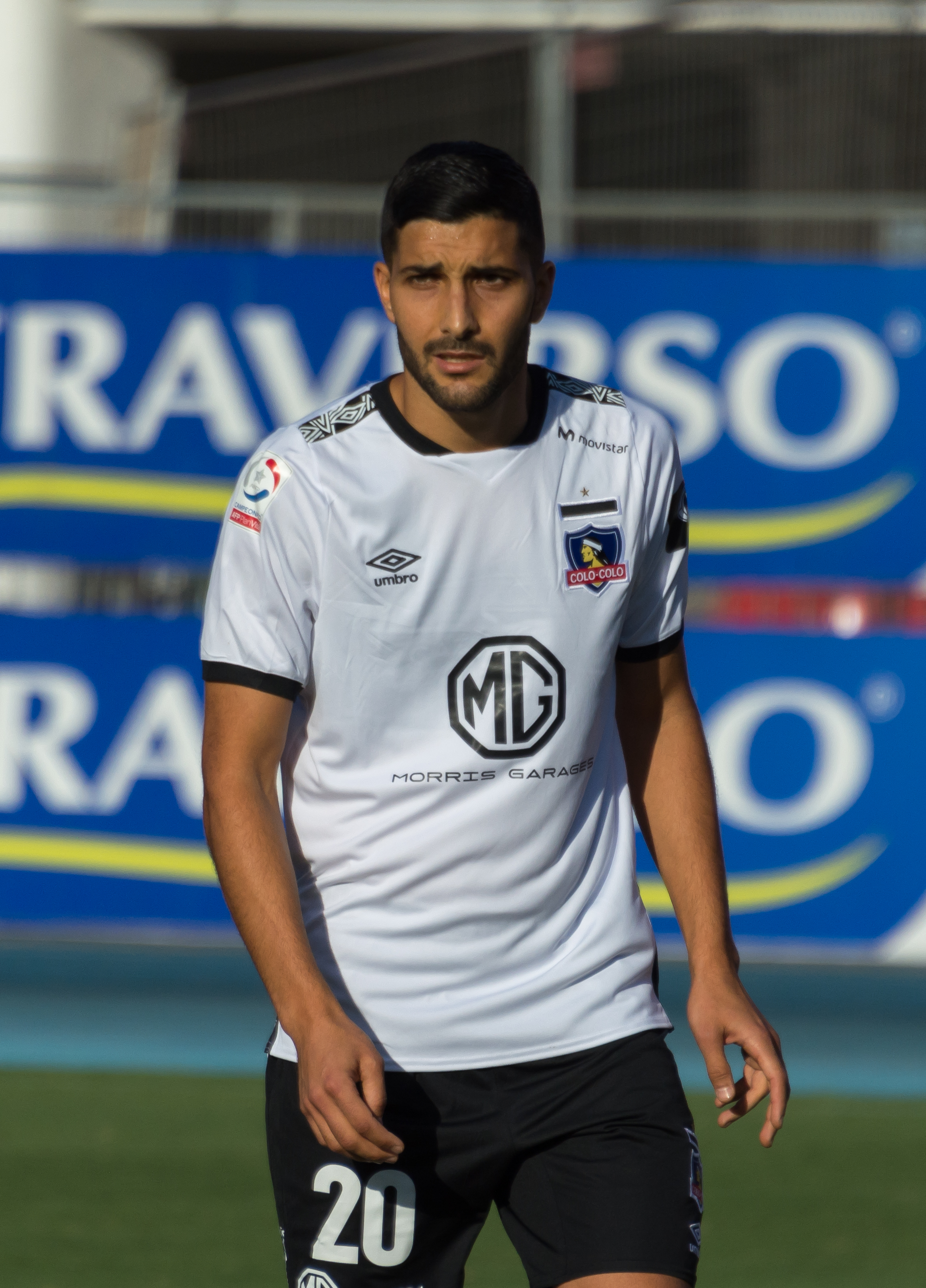 Audax Italiano v Colo-Colo, Estadio Nacional, Ñuñoa, Santiago, Región Metropolitana, Chile